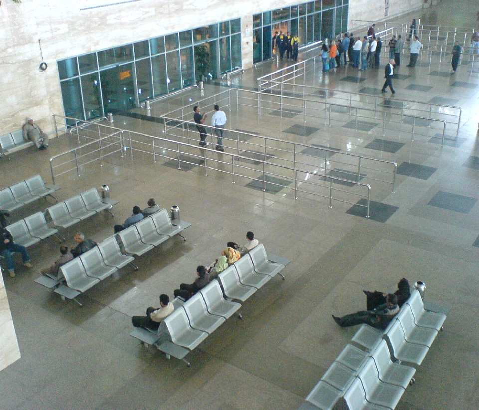 صورة من داخل مبنى رقم 1 صالة الوصول من مطار القاهرة